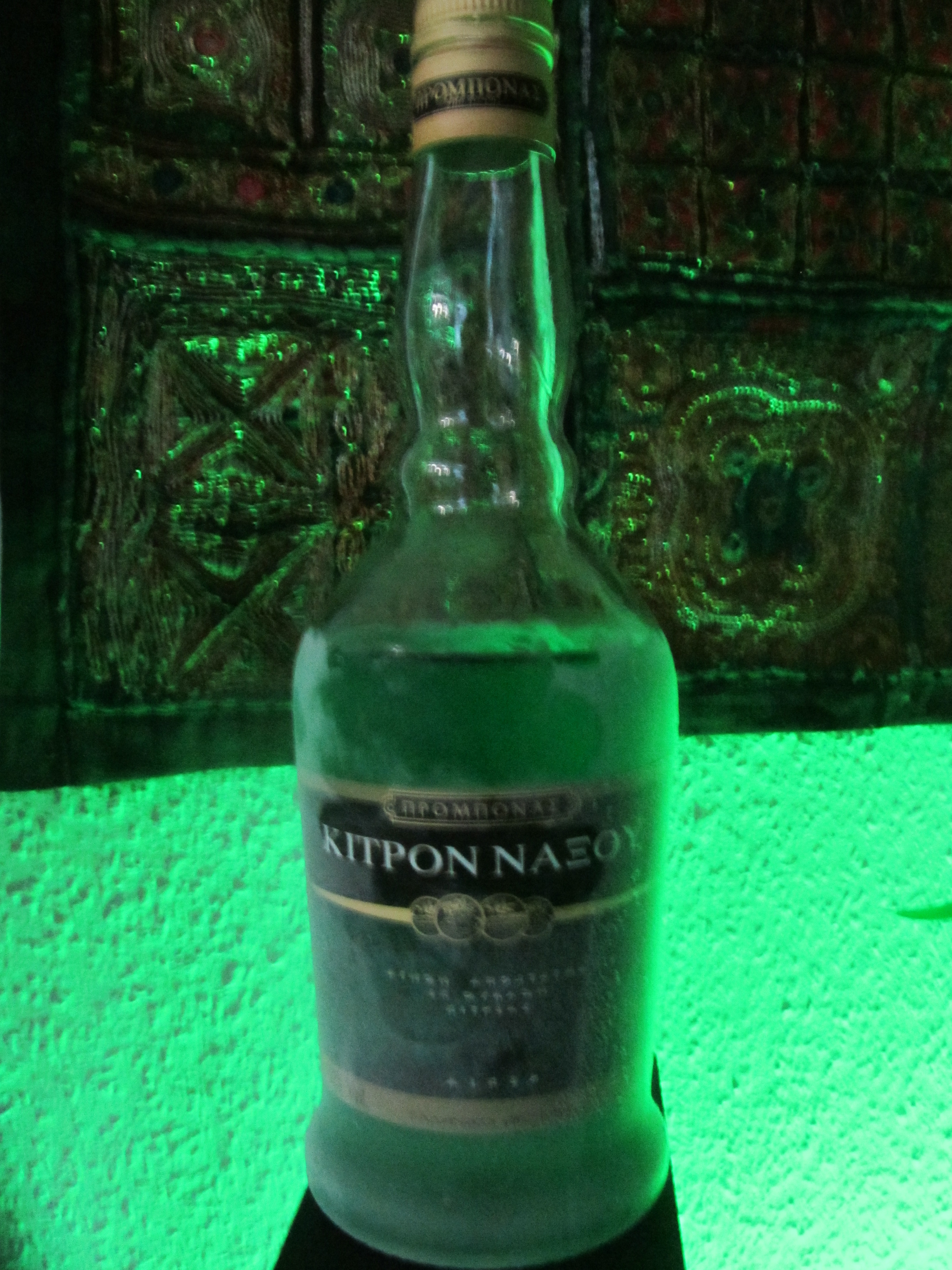 Kitron ist ein griechischer Likör und wird nur auf der Insel Naxos produziert. Außerhalb von Naxos ist der Likör eher schwierig zu finden. Hergestellt wird Zitron aus der Frucht und den Blättern des Zitrusbaumes. Kitron gibt es in drei verschiedene Variationen. Grüner Zitron ist im Geschmack sehr süß und enthält 30% Alkohol, etwas weniger als der klare und etwas stärkere Zitron. Die gelbe Variation des Zitrons ist die stärkste mit dem höchsten Alkoholgehalt und der geringsten Menge an Zucker.